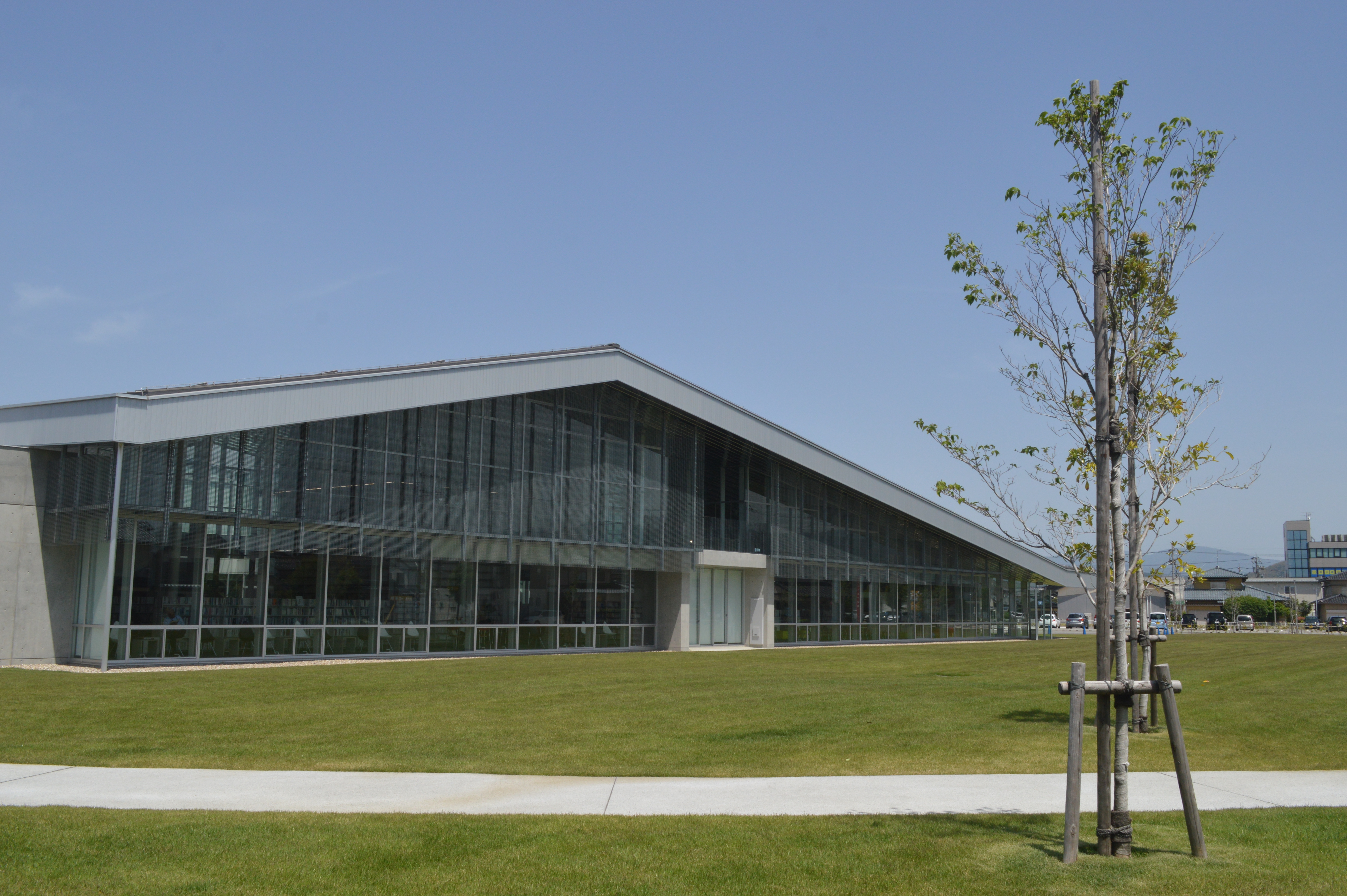 石川県野々市市の学びの杜ののいちカレード。野々市市立図書館が入っている。